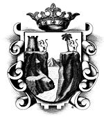 Escudo del Estado de Chiapas Antigüo